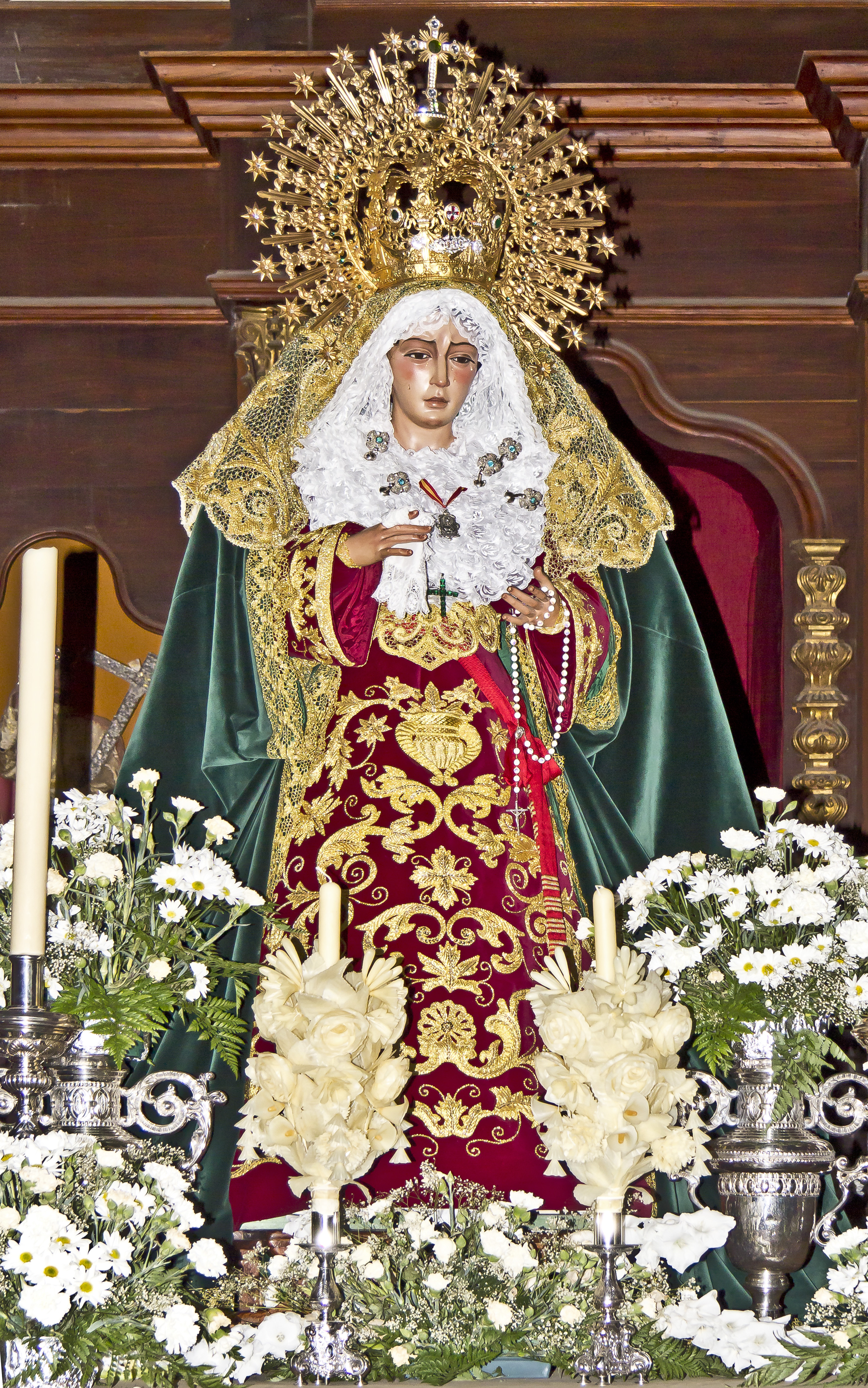 Die Figur der Santa María de la Esperanza Macarena in der Kirche Nuestra Señora de la Concepción in Santa Cruz de Tenerife wurde von Antonio Giménez Martínez nach einem Vorbild in Sevilla geschaffen. Die Figur befindet sich hier auf der Transporteinrichtung für die Prozession. Sie ist hier in der Bekleidung der Fastenzeit zu sehen.